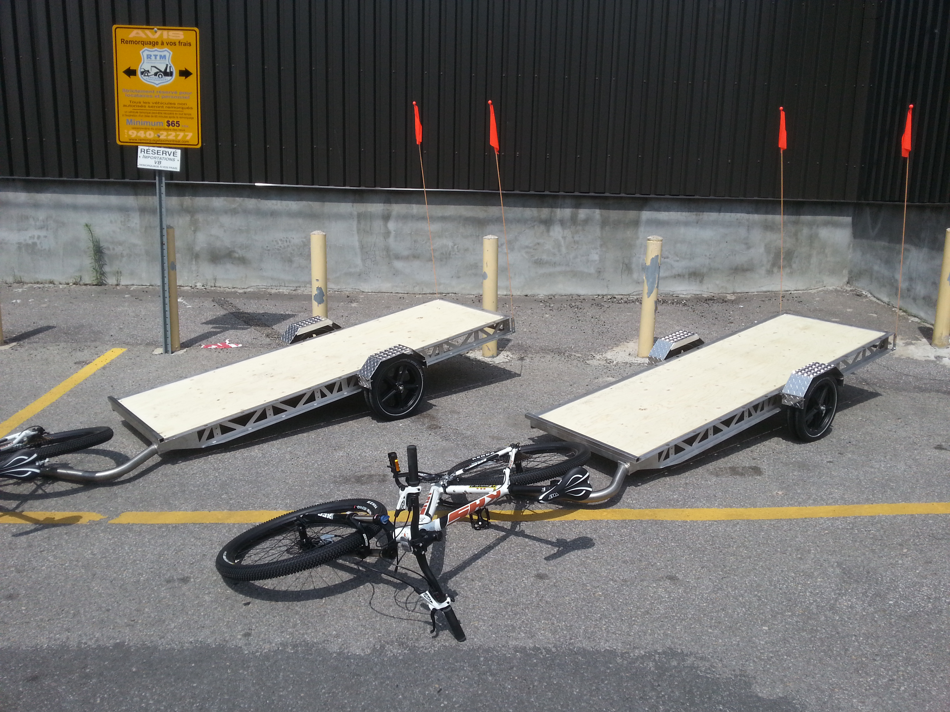 Ces remorques de vélo, conçues pour le déménagement, sont des plateformes d'environ 2.4 m par 75 cm. Elles ont été fabriquées pour Déménagement Myette par les Ateliers Mélim Inc. Leur structure est en acier inoxydable et elles pèsent environ 50 kg chacune. Elles ont un essieu à doubles roues et une capacité de charge de plus de 300 kg. En terme de volume, elle peuvent contenir jusqu'à environ 6 mètres cubes. Les vélos sont des KHS Alite 1000.